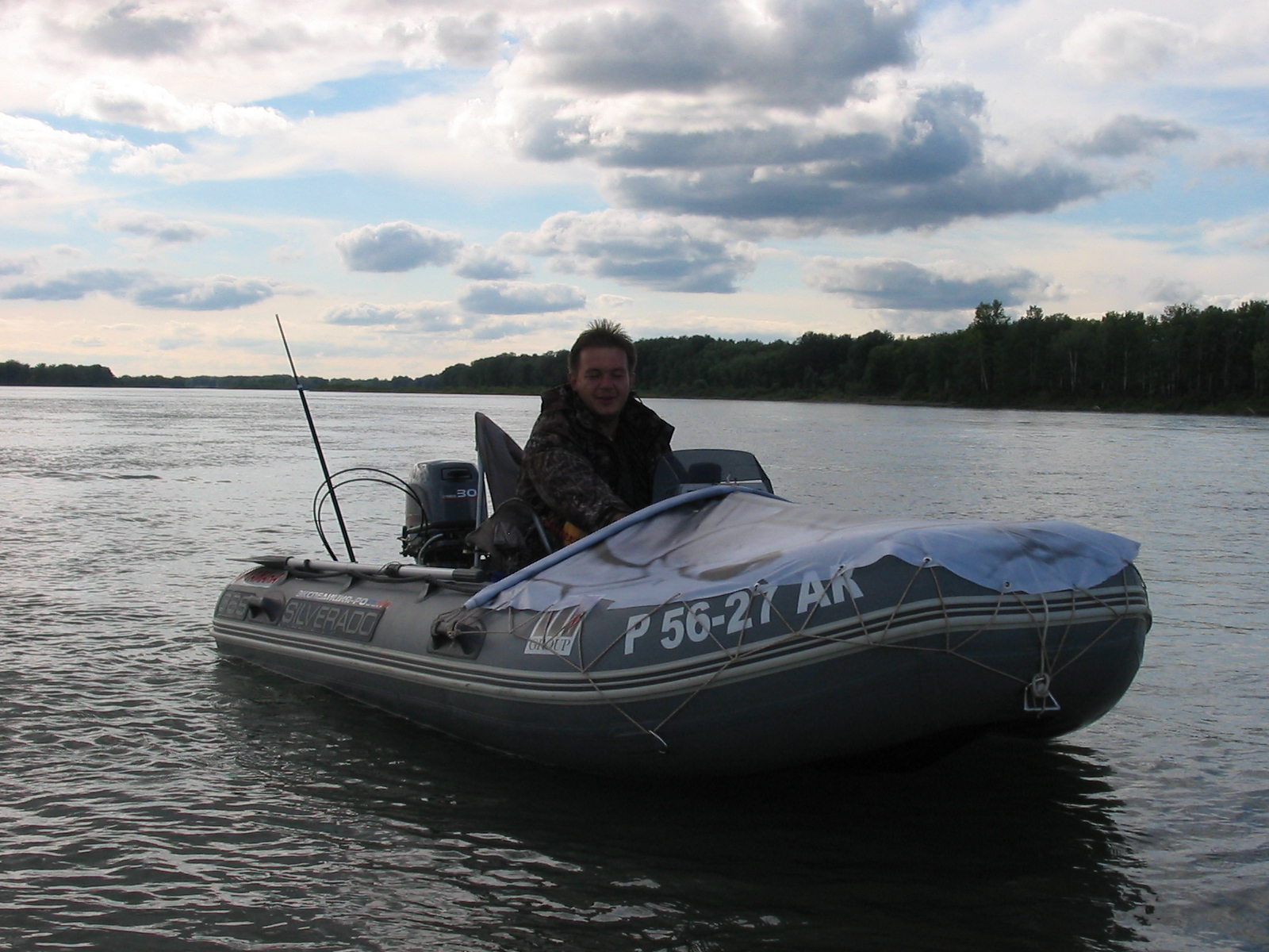 Надувная моторная лодка